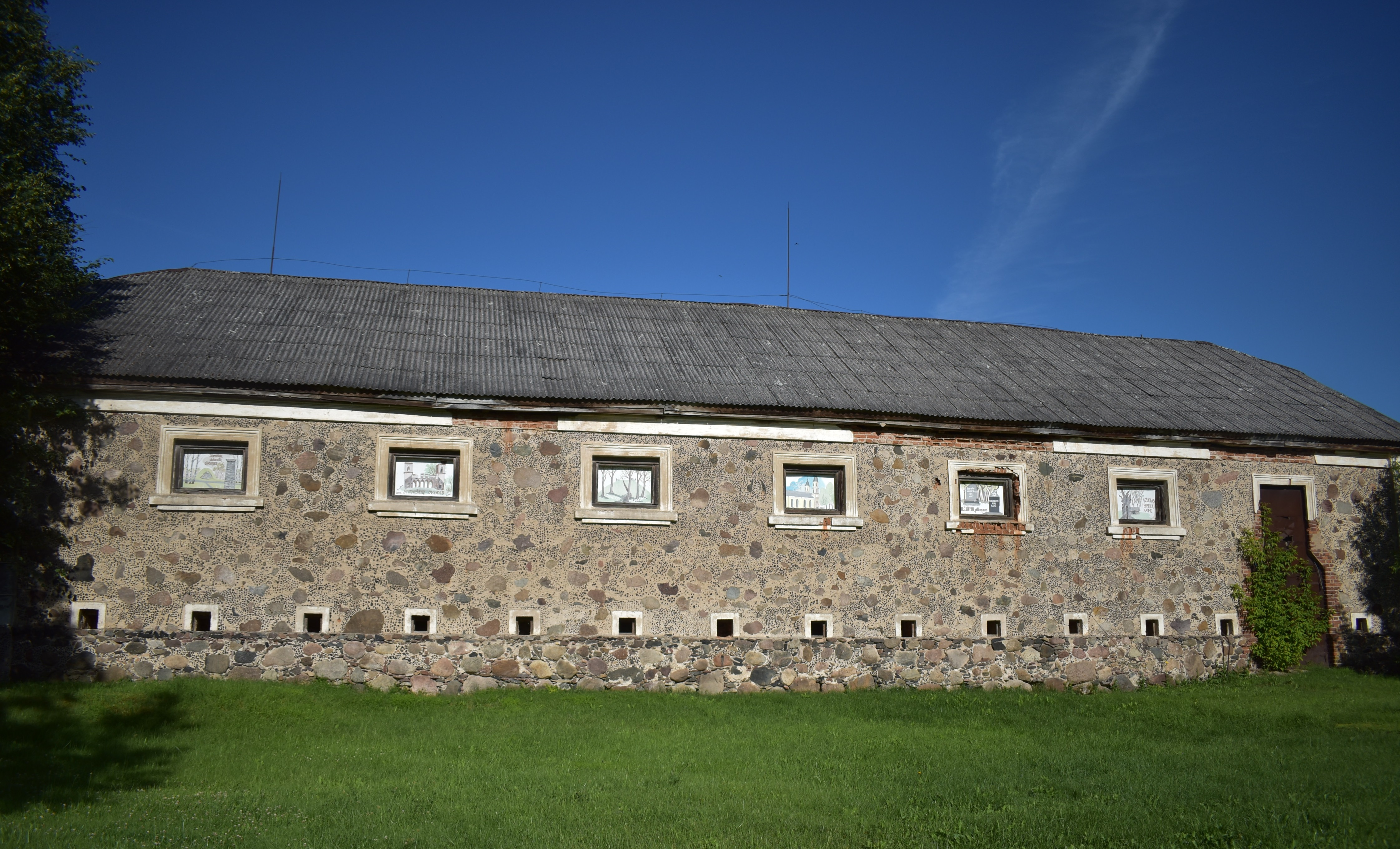 Grūdų sandėlis